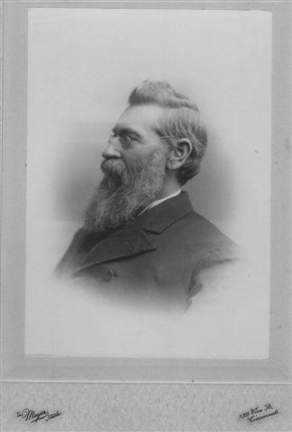 Gustav Brühl, deutscher Arzt, Schriftsteller und Philosoph